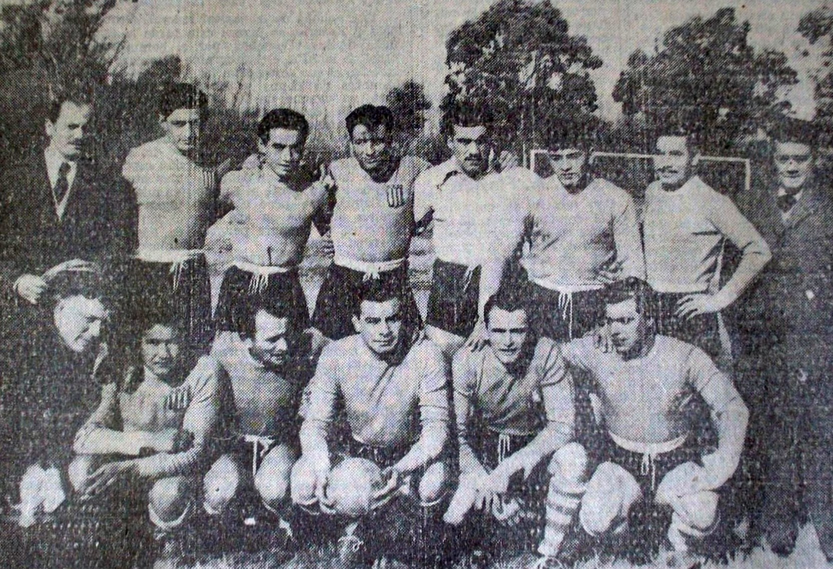 Equipo del Club Atlético Sansinena Campeón de Segunda División de la Liga del Sur